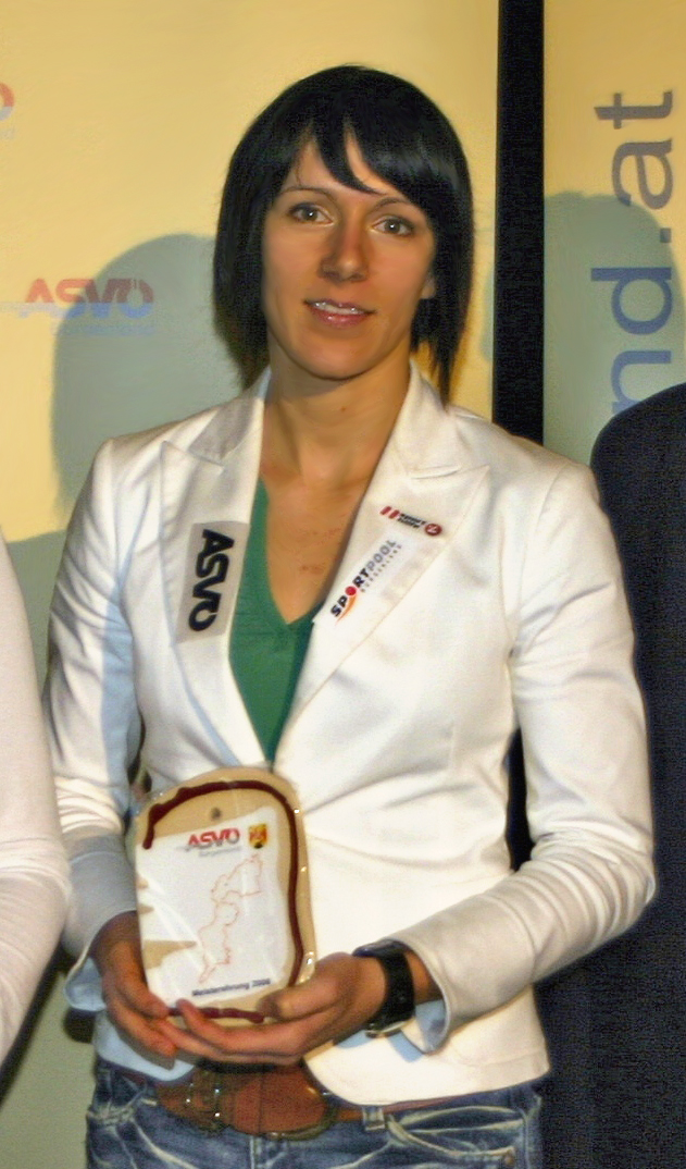 Nicole Trimmel bei der ASVÖ Preisverleihung